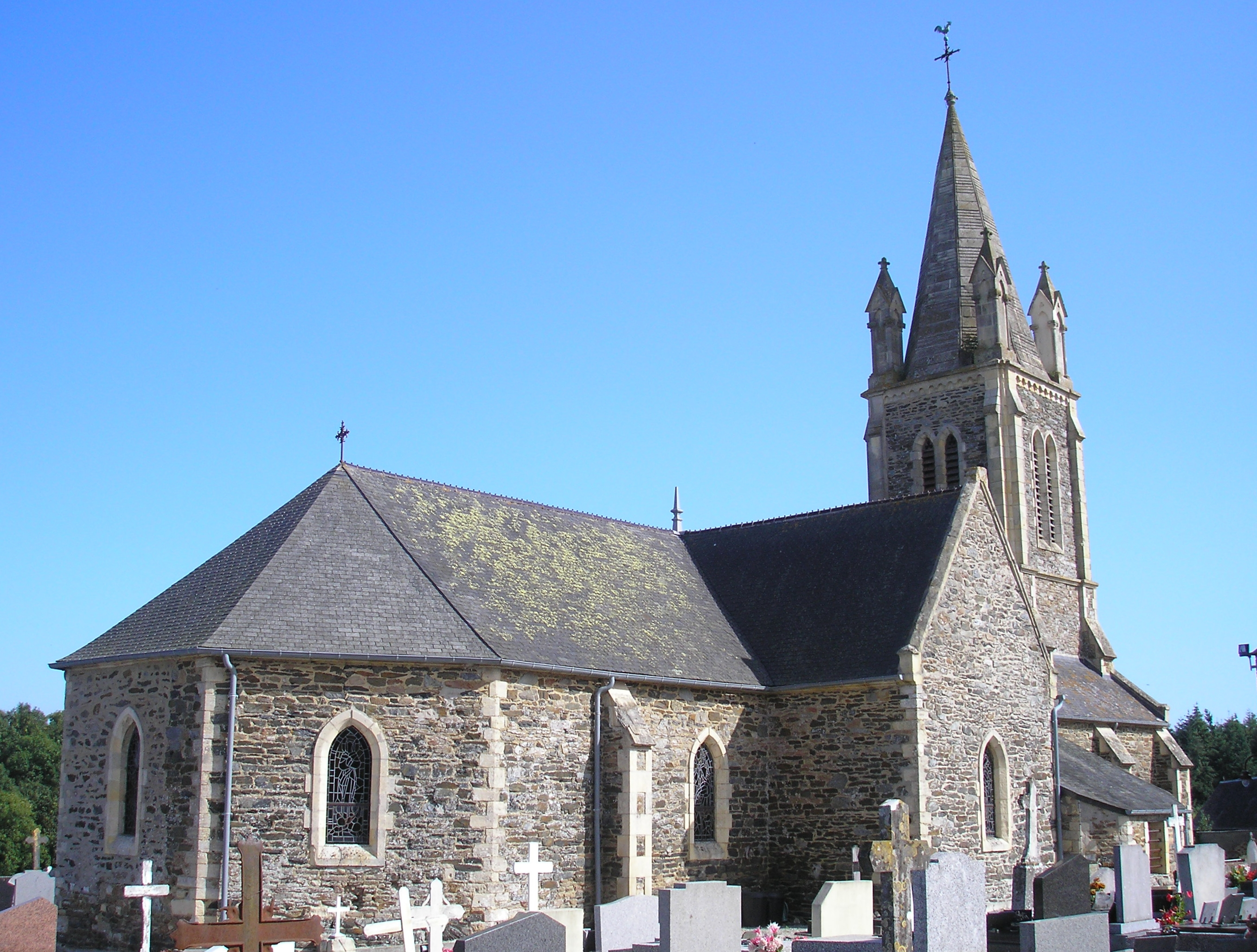 Saint-Jean-de-Savigny (Normandie, France). L'église Saint-Jean-Baptiste.